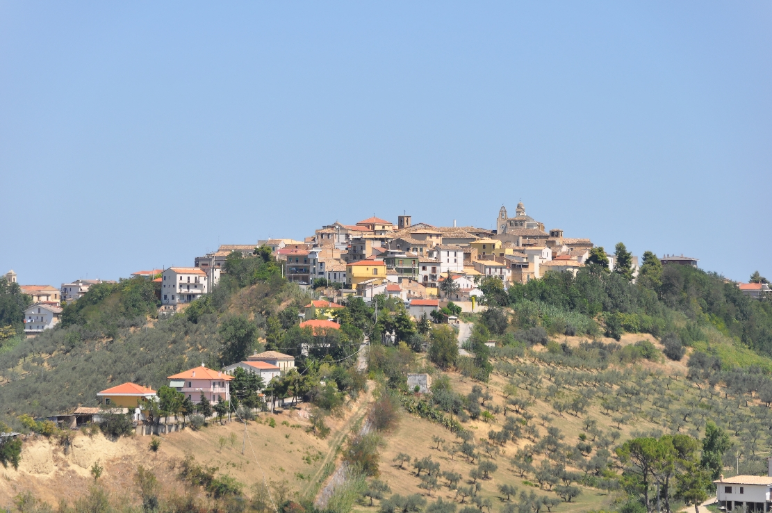 Pianella 2012